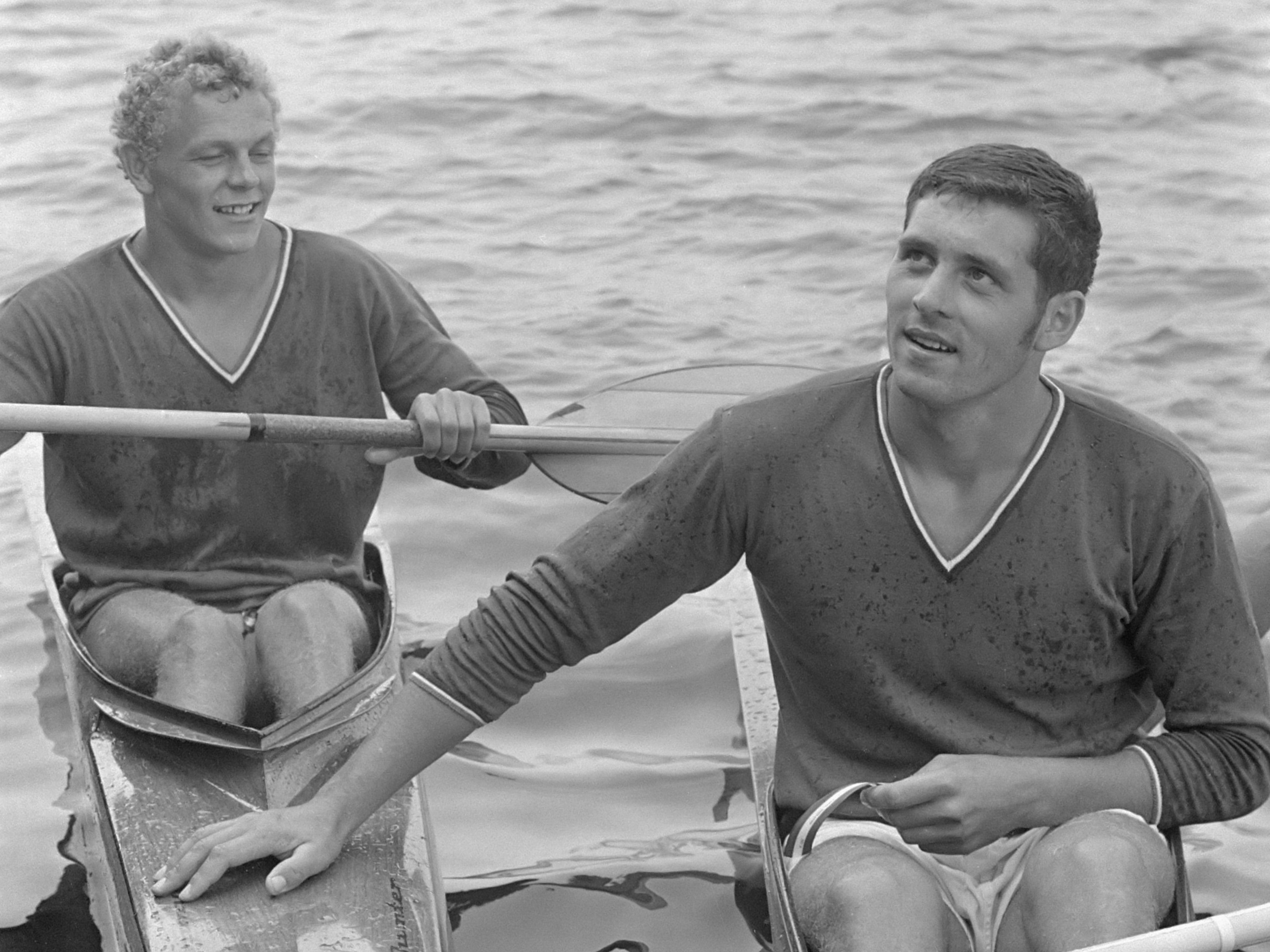 Hongaarse kanoërs Svidró (l) en Csapó 13 juni 1971